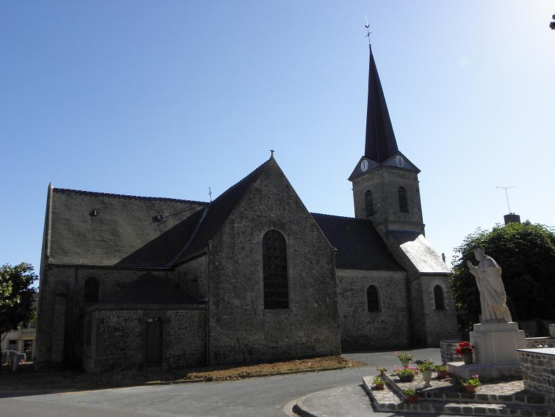 Église Saint-Pierre de Brains-sur-les-Marches (53).